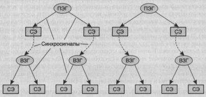 Организация распределения